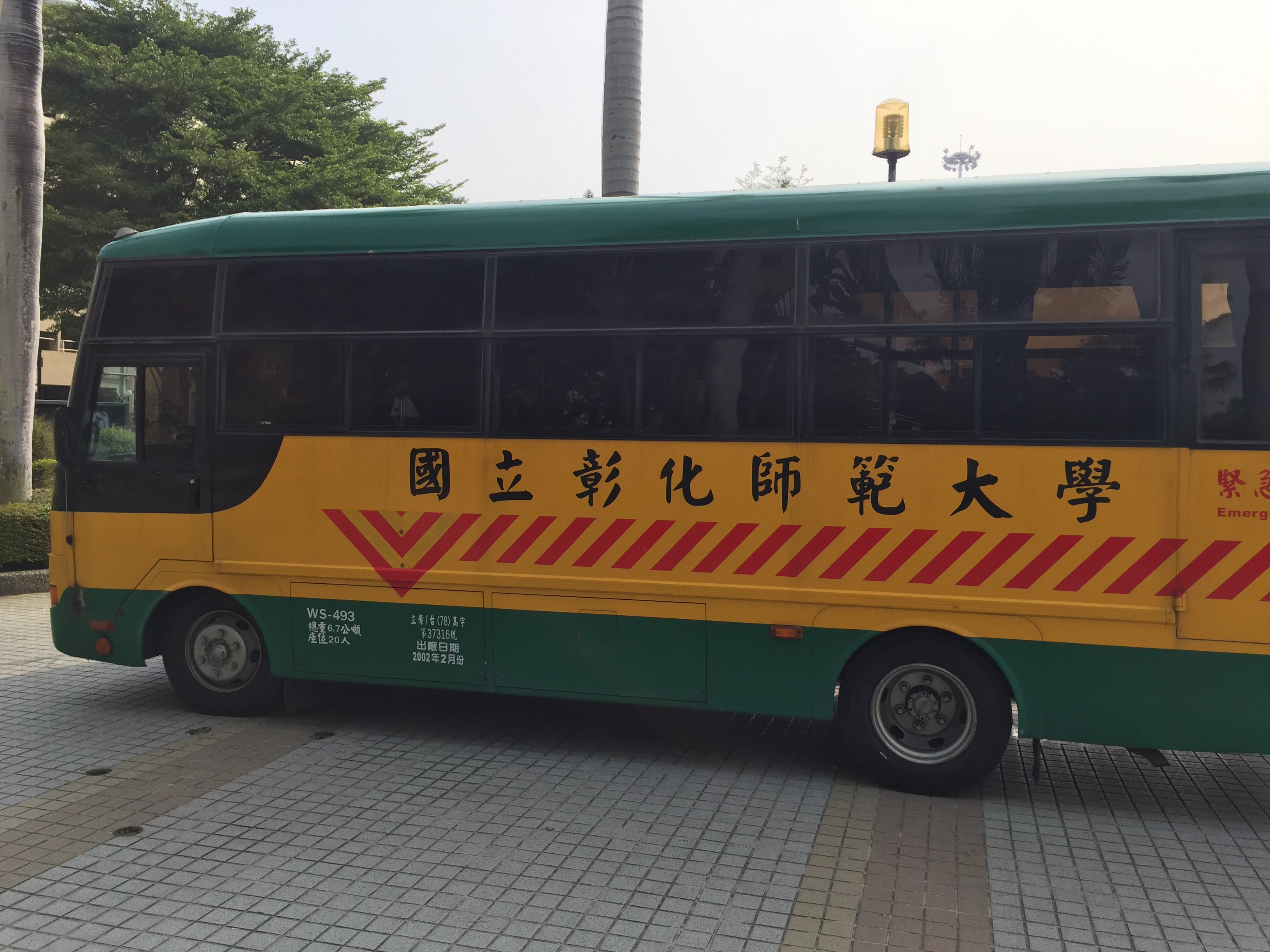 彰師大校車(小)